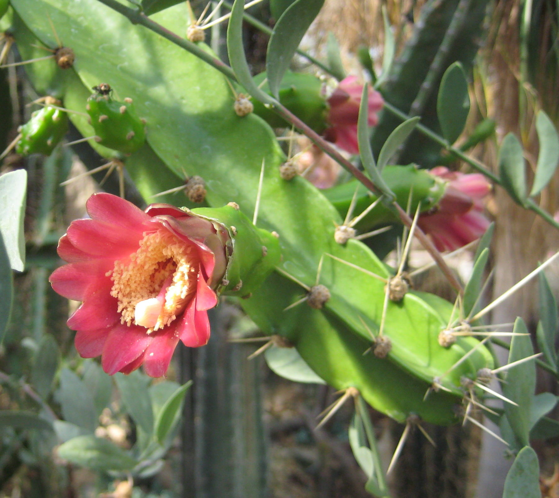 Calymmanthium substerile im Botanischen Garten Dresden